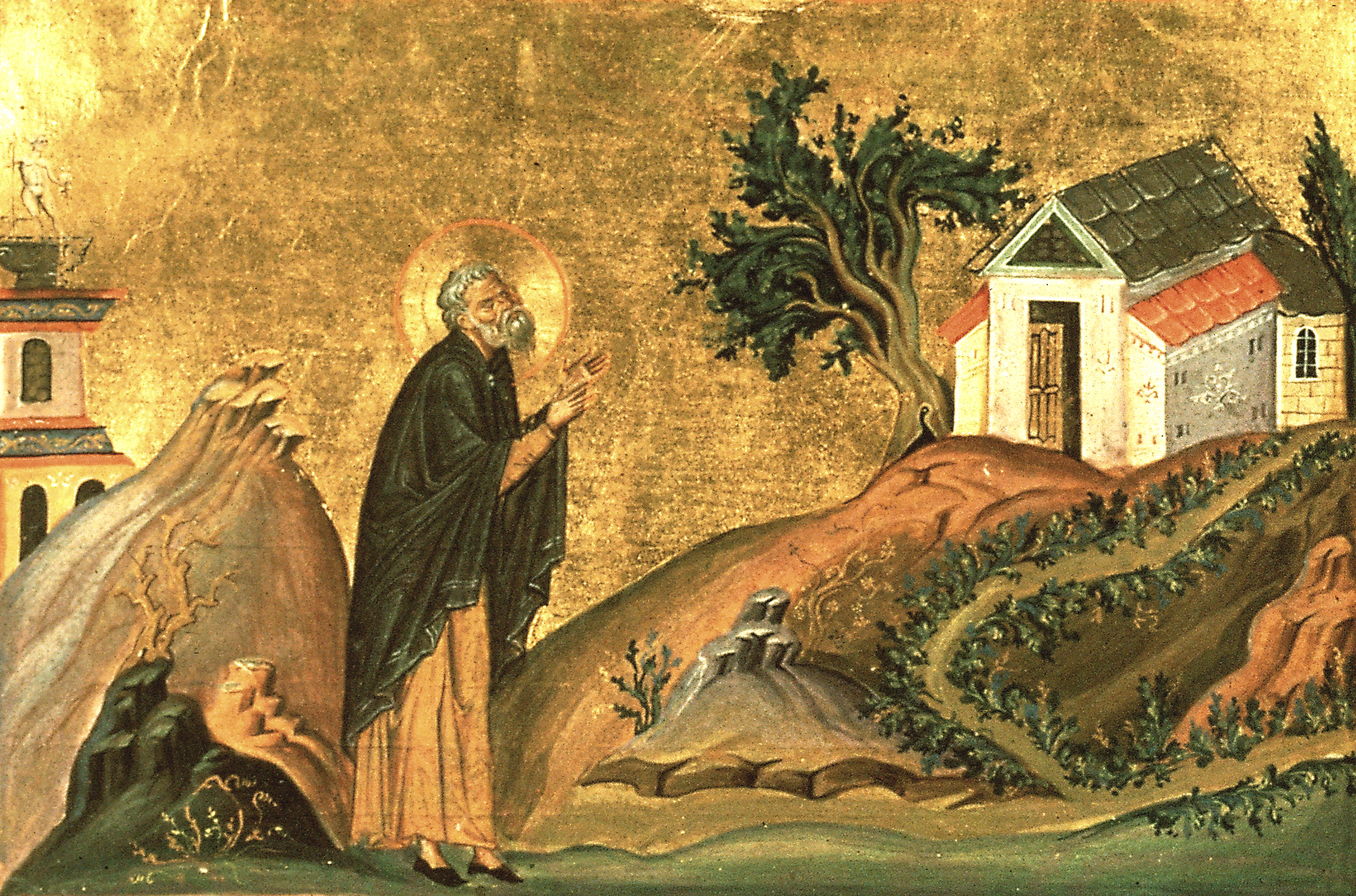 Преподобный Исидор Пелусиот Константинополь. 985 г. Миниатюра Минология Василия II. Ватиканская библиотека. Рим.